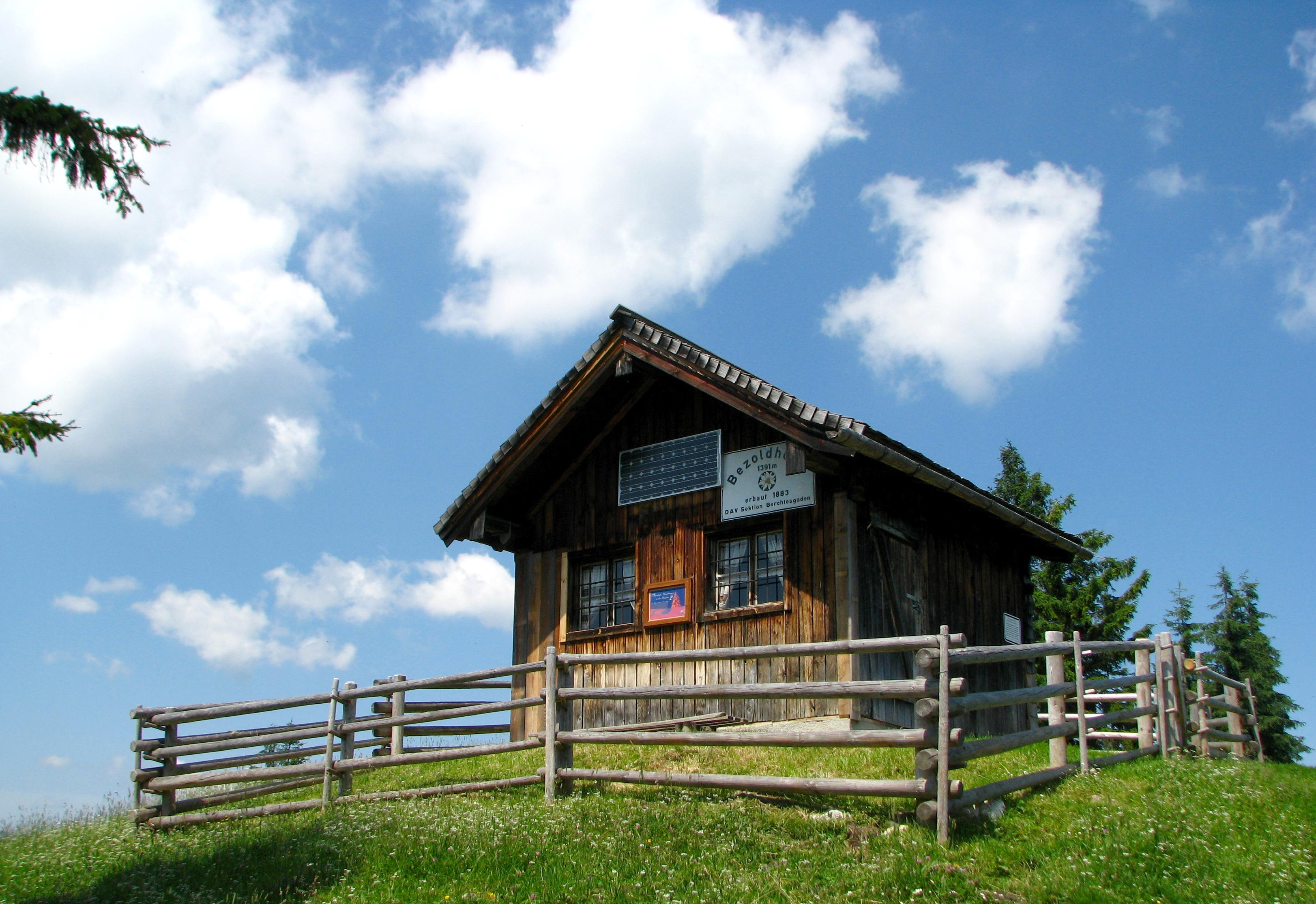 Die Bezoldhütte auf dem Toten Mann (1392 m) im Berchtesgadener Land.